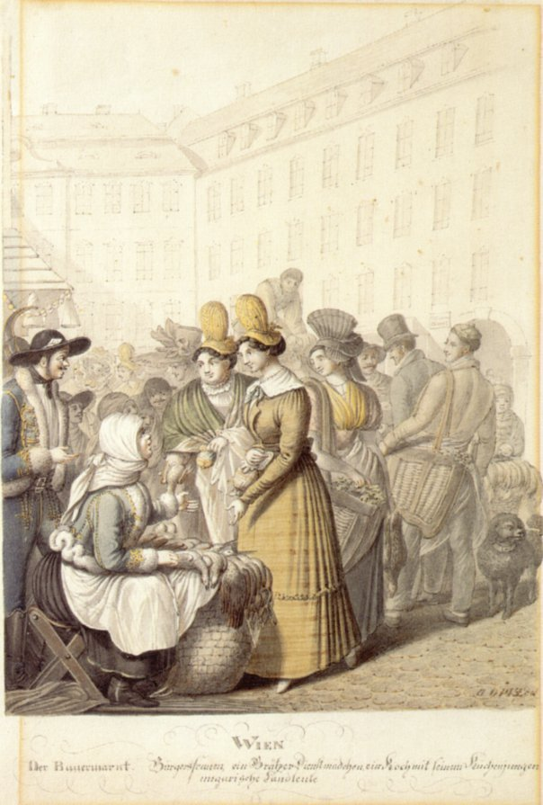 Georg Emanuel Opitz: Am Bauernmarkt (um 1825/30), Aquarell und Feder, 36,8 x 26,2 cm, Wien Museum Inv. Nr. 37.097 (Bürgersfrauen, ein Grätzer Dienstmädchen, ein Koch mit seinem Küchenjungen, ungarische Landleute)